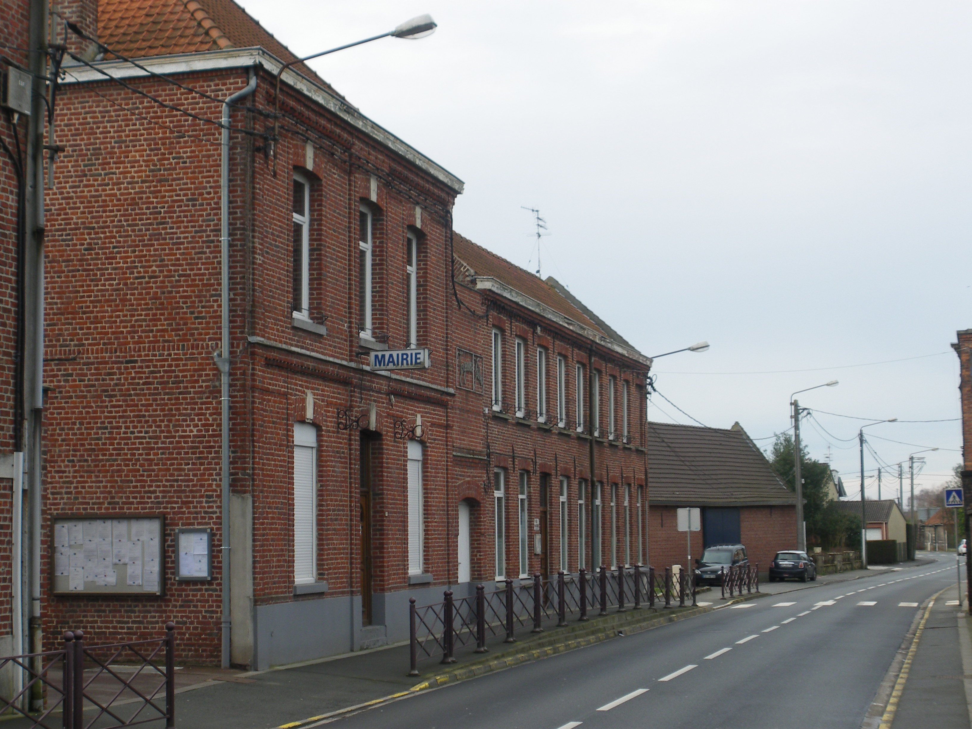 Vue de la mairie de Vendeville.